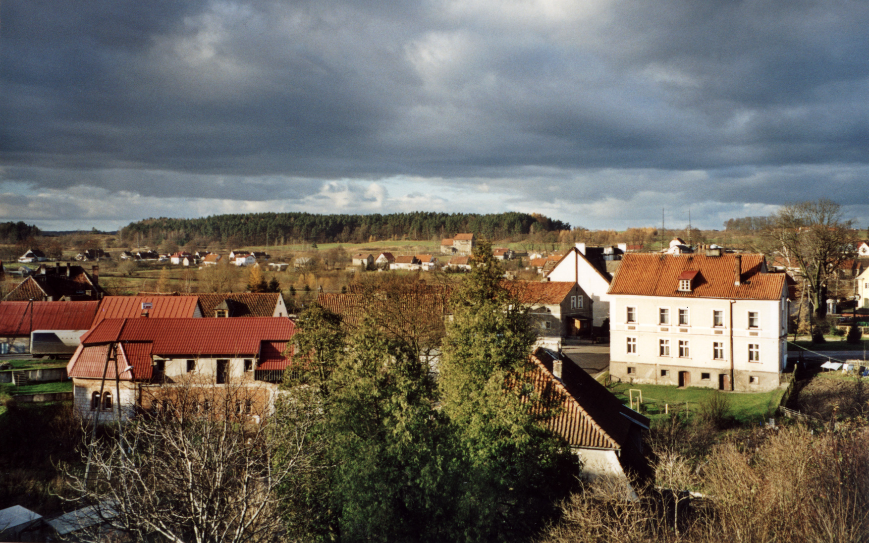 Blick über Miłakowo.